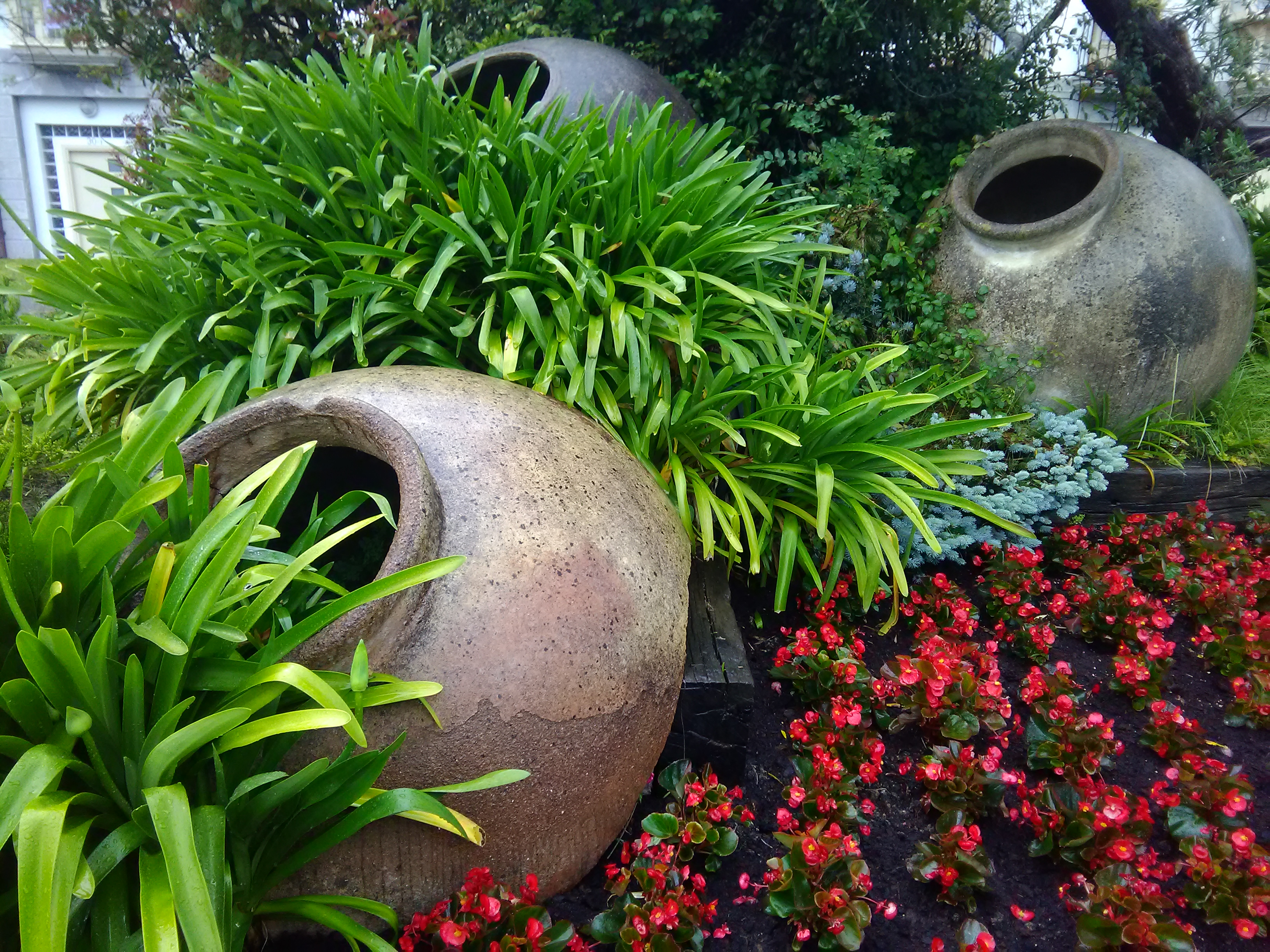 1998an, Lekeitioko Beaskokaleko 12 zenbakiaren orubean eginiko obra batzuetan, XVI. mendeko 21 tina aurkitu ziren, bale-koipe biltegia. Osorik zeuden tinak Bilboko Arkeologi Museora bidali ziren, eta hautsita zeuden hauek Atea kaleko lorategian daude ikusgai.